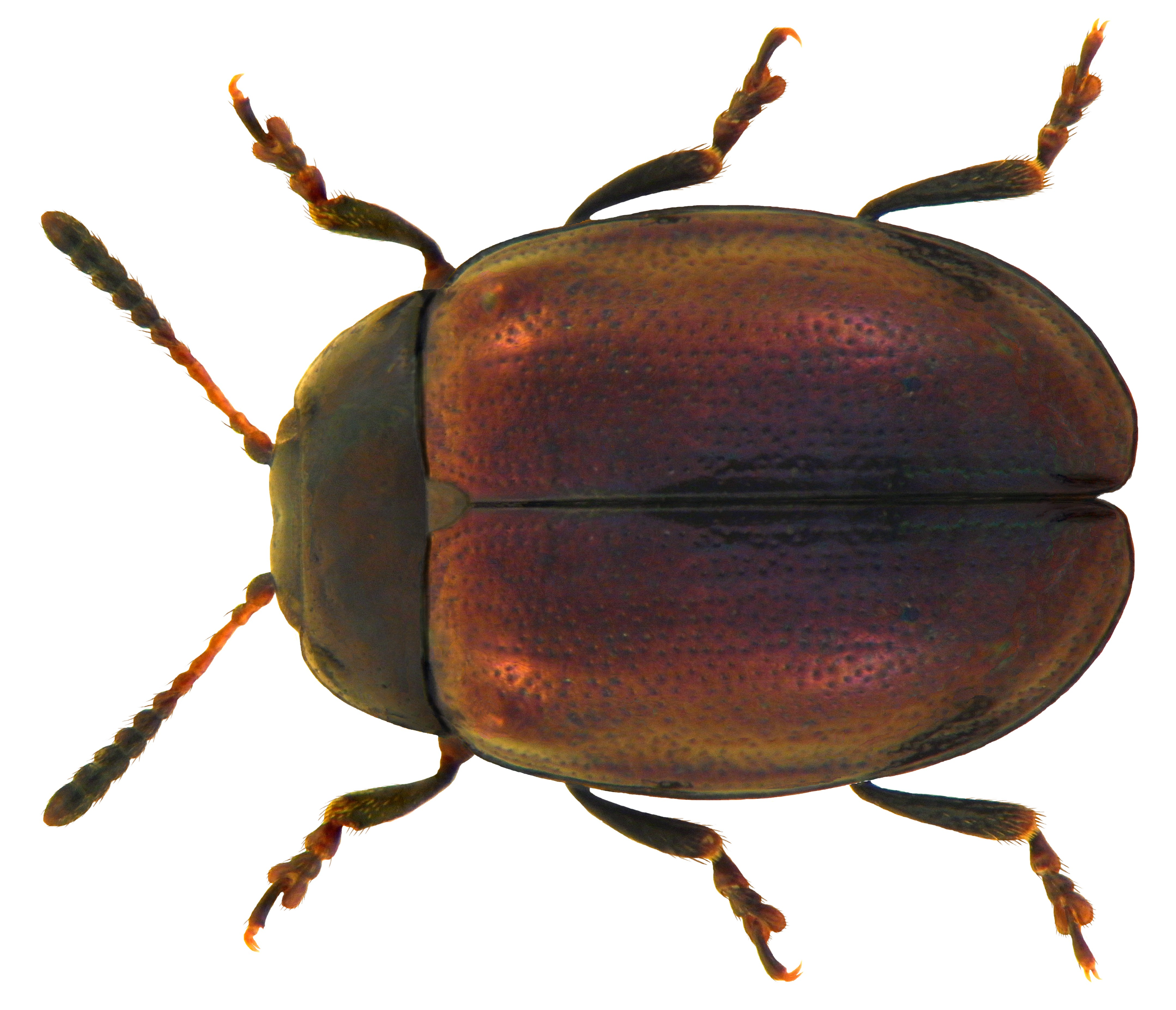 Plagiodera versicolora (Laicharting, 1781) Familie: Chrysomelidae Groesse: 2,5-4,5 mm Verbreitung: Europa Oekologie: an Salix- und Populus-Arten Fundort: Germania, Bayern, Oberfranken, Kulmbach leg.det. U.Schmidt, 1993 Photo: U.Schmidt, 2010